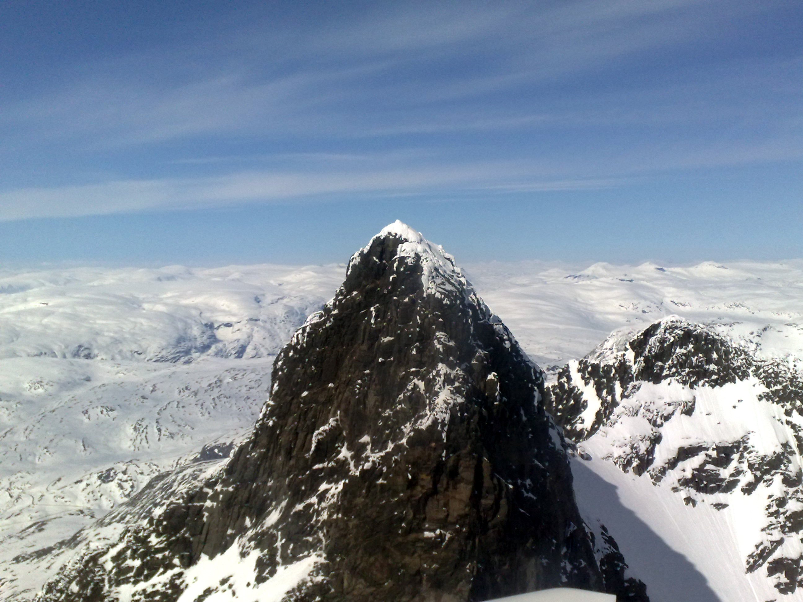 Frå Jotunheimen